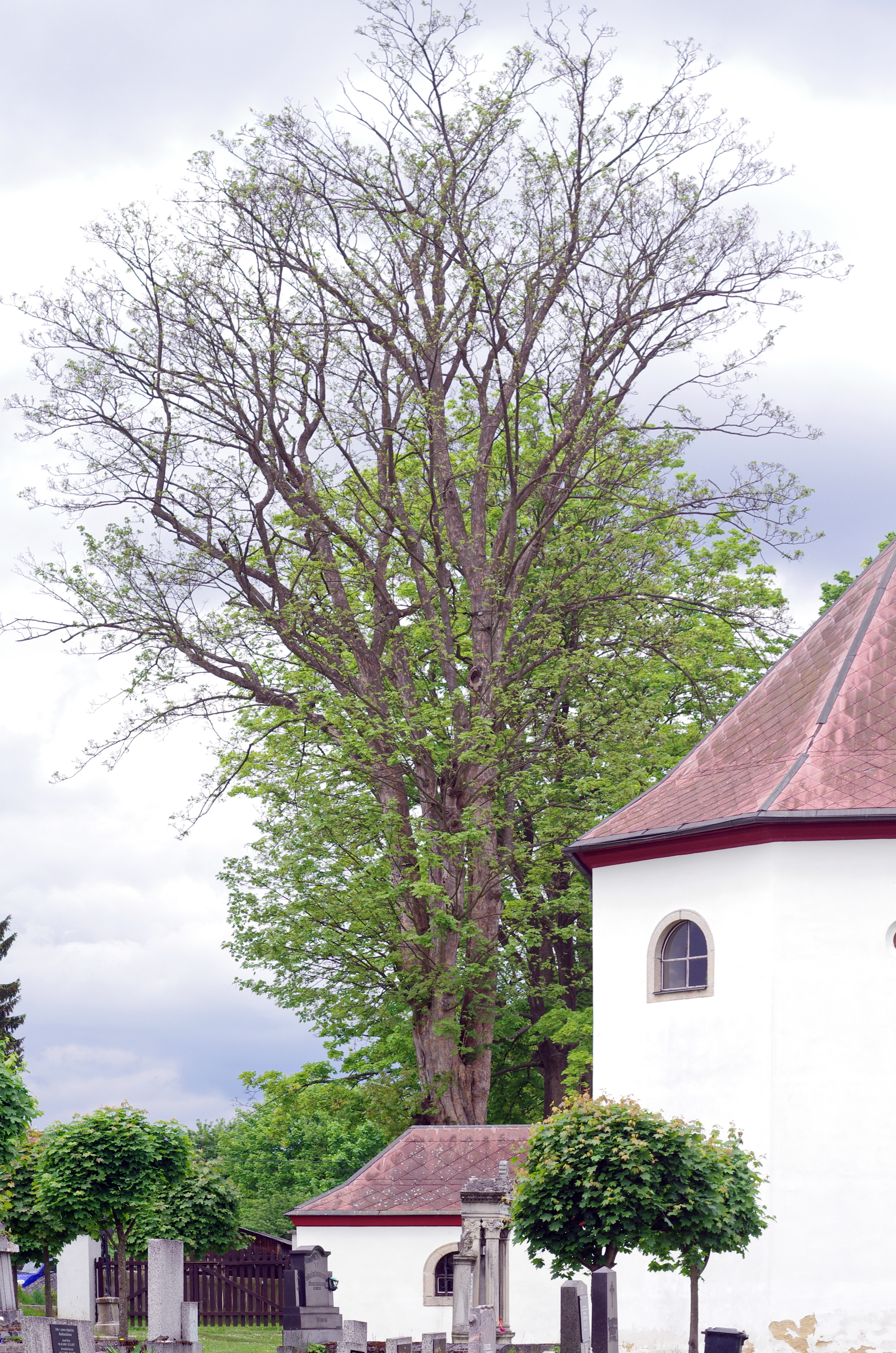 Památné stromy Javory u kaple, Luby, okres Cheb